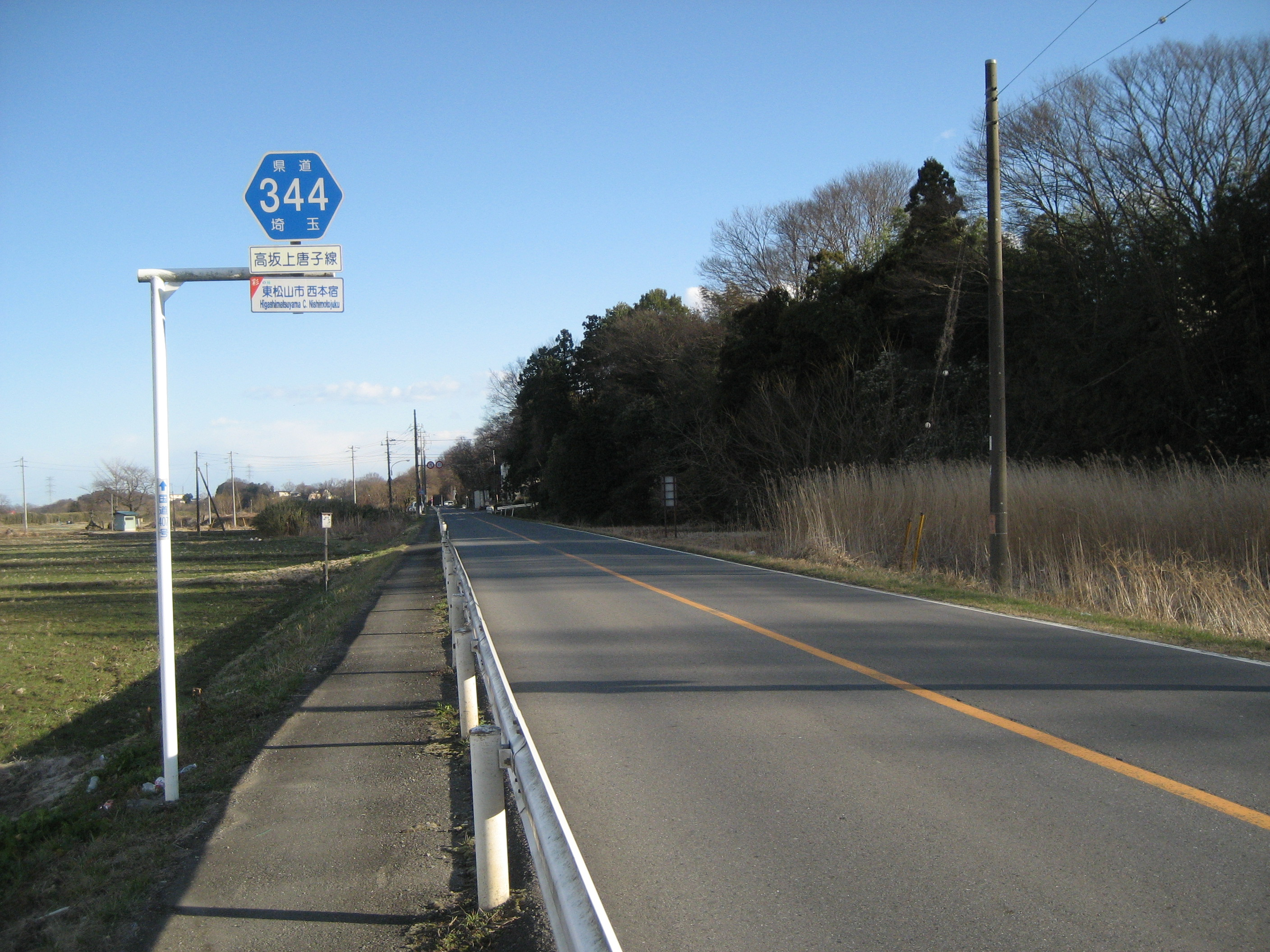 埼玉県道344号線東松山市内